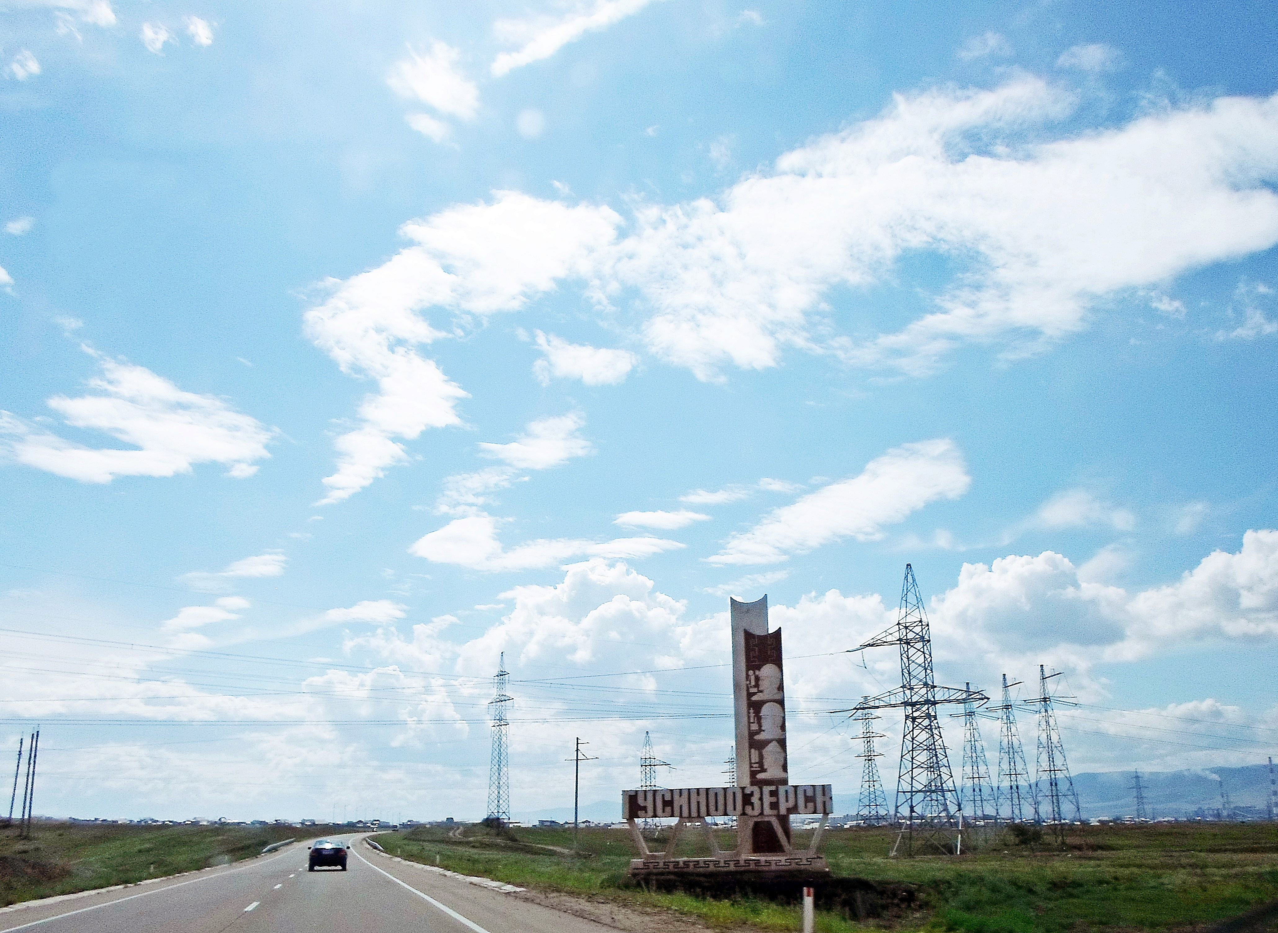 Кяхтинский тракт, на подъезде к Гусиноозёрску со стороны Улан-Удэ.